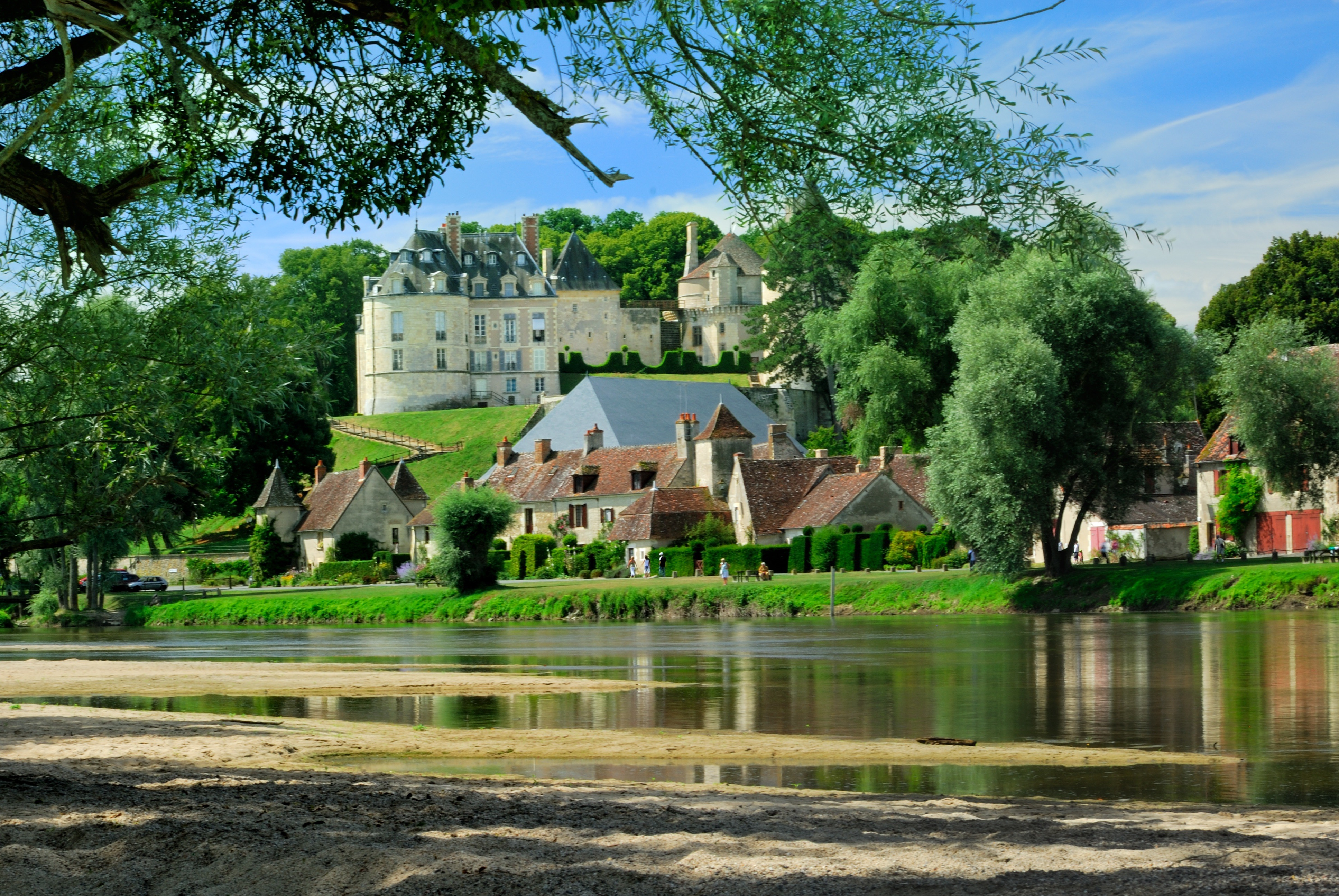 Vue générale du village d'Apremont